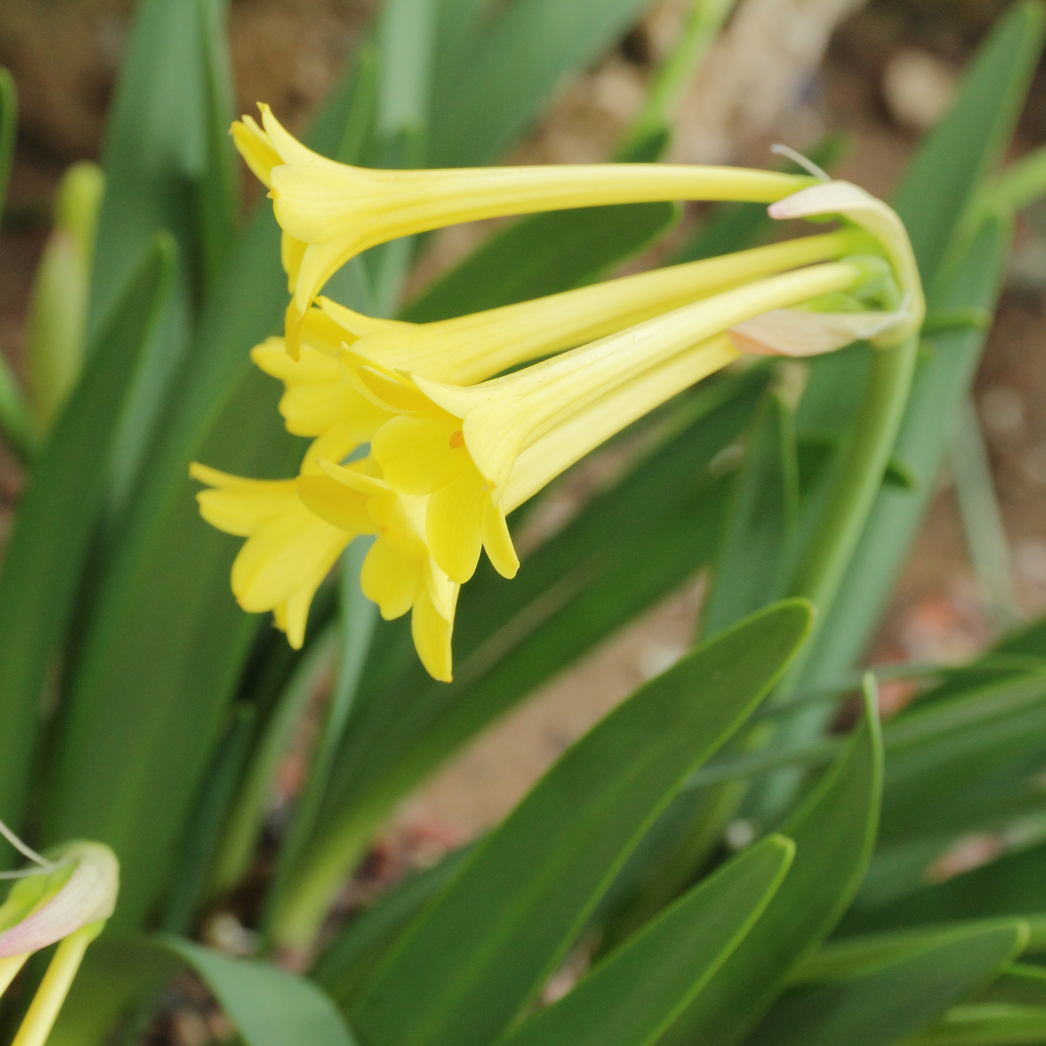 Cyrtanthus flanaganii i Göteborgs Botaniska Trädgård.